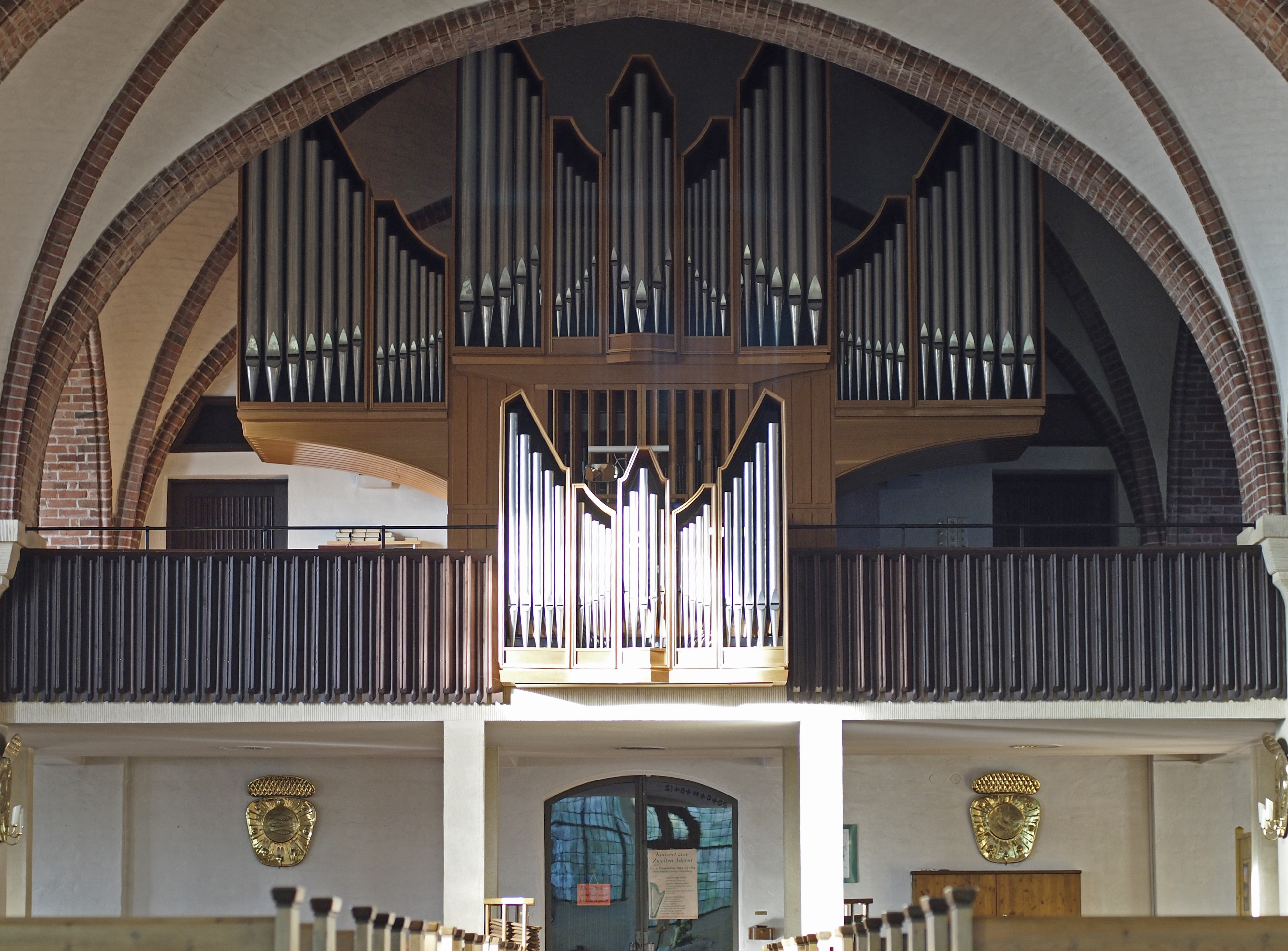 Orgel der St.-Peter-Paul-Kirche in Hermannsburg (Germany)